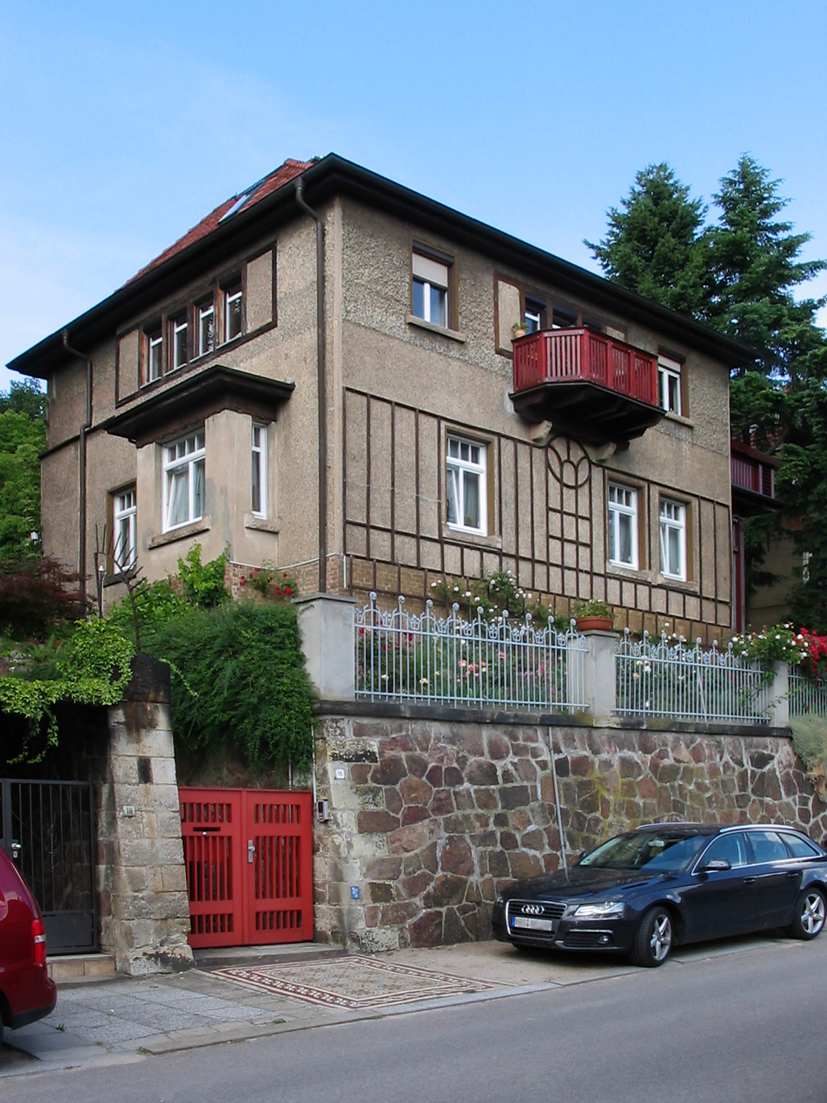 Radebeul, Villenkolonie Altfriedstein, Villa Prof.-Wilhelm-Ring 16